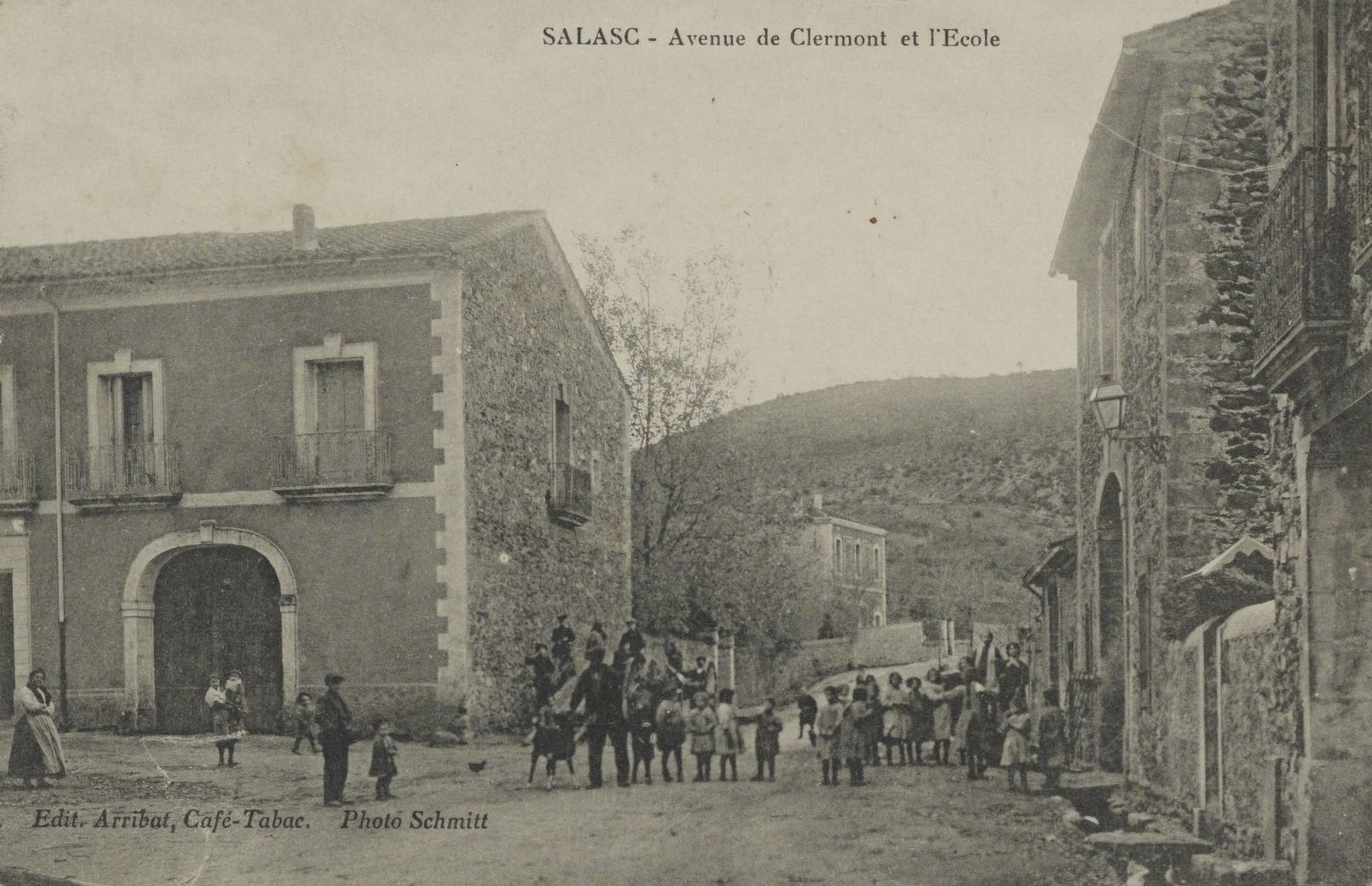 Salasc. - Avenue de Clermont et l'école : carte postale.